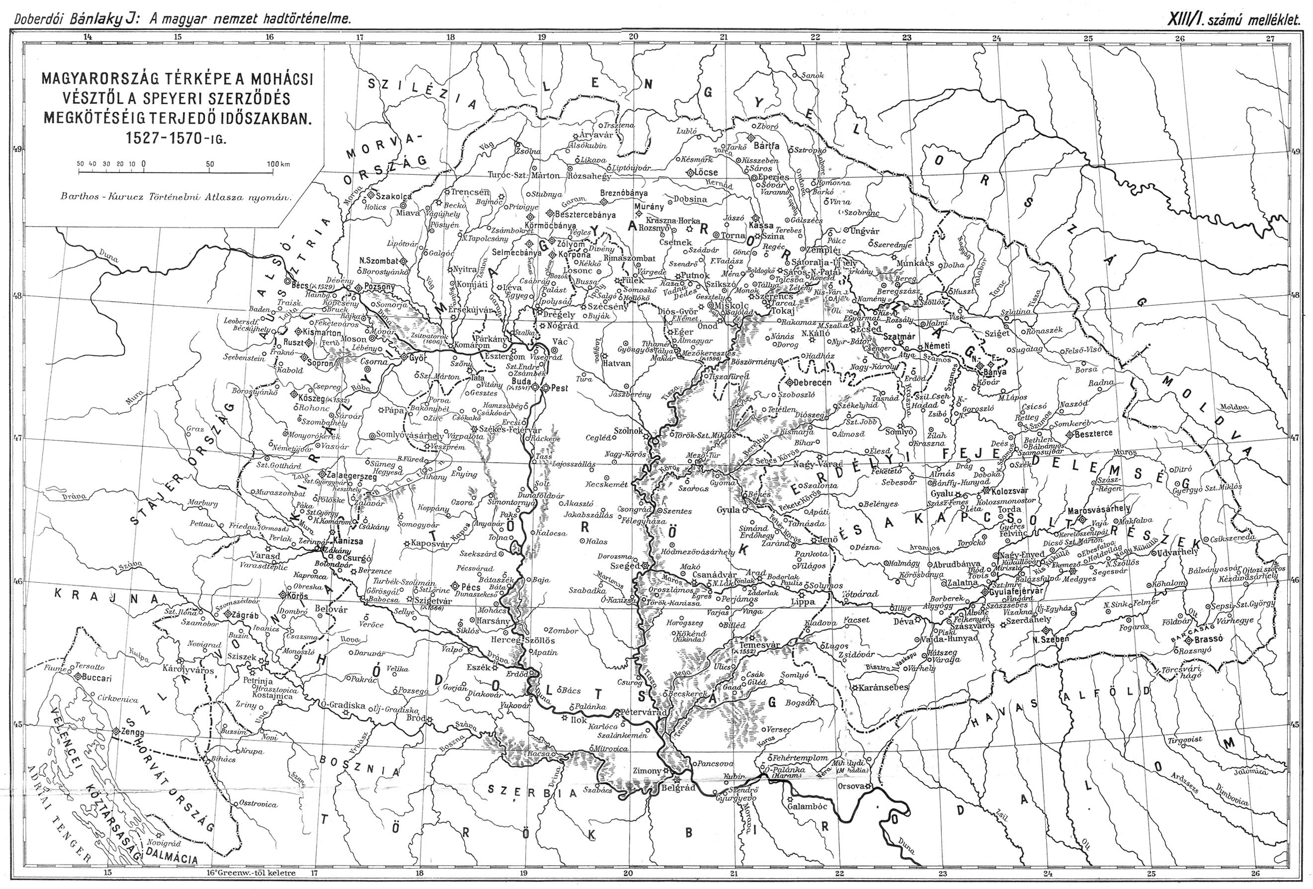 A magyar nemzet hadtörténelme, I–XXII. (Budapest, 1928–1942) Magyarország térképe a mohácso vésztől a speyeri szerződés megkötéséig terjedő időszakban 1527-1570-ig